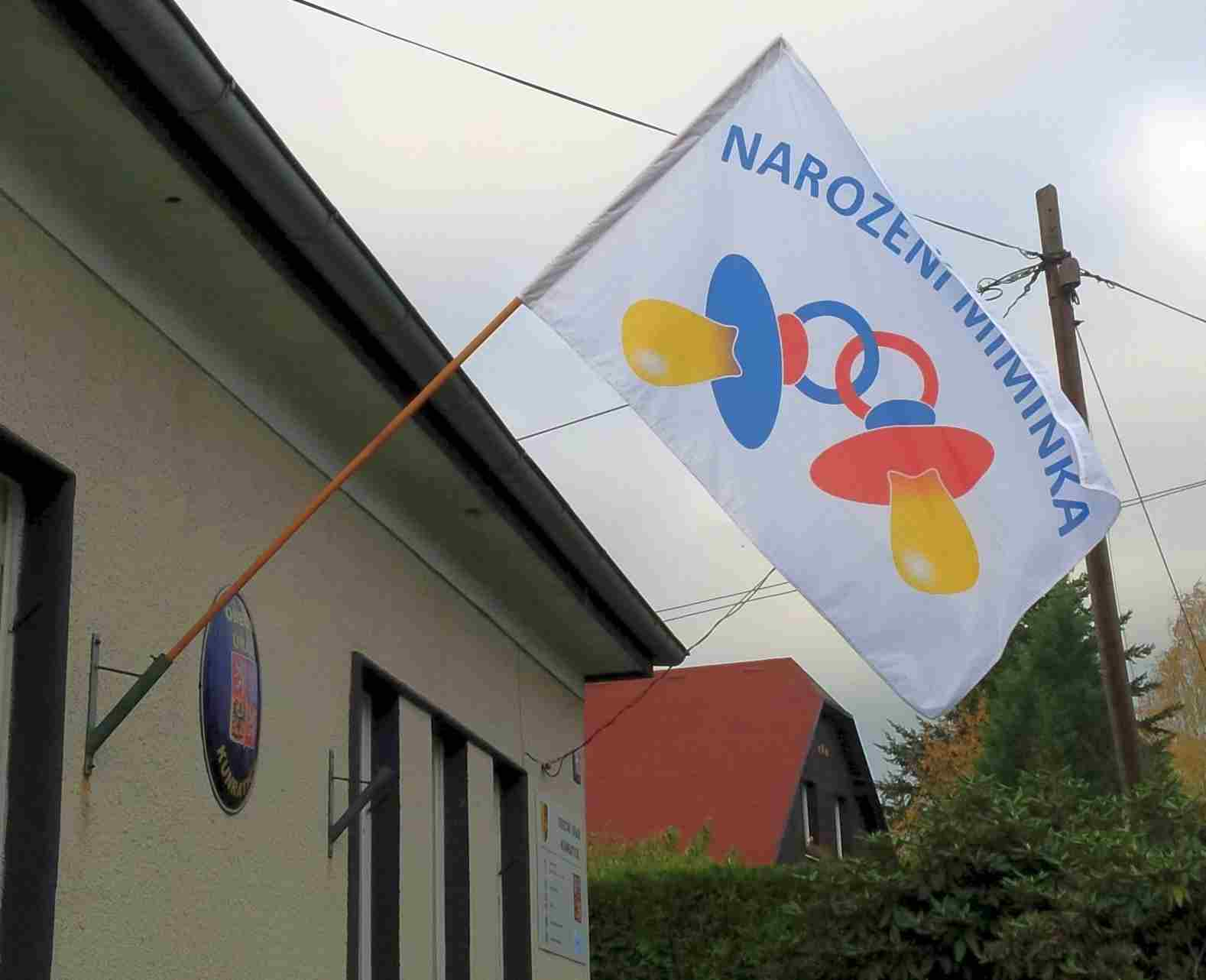 Vlajka oznamující narození miminka v obci Kunratice v okrese Liberec.